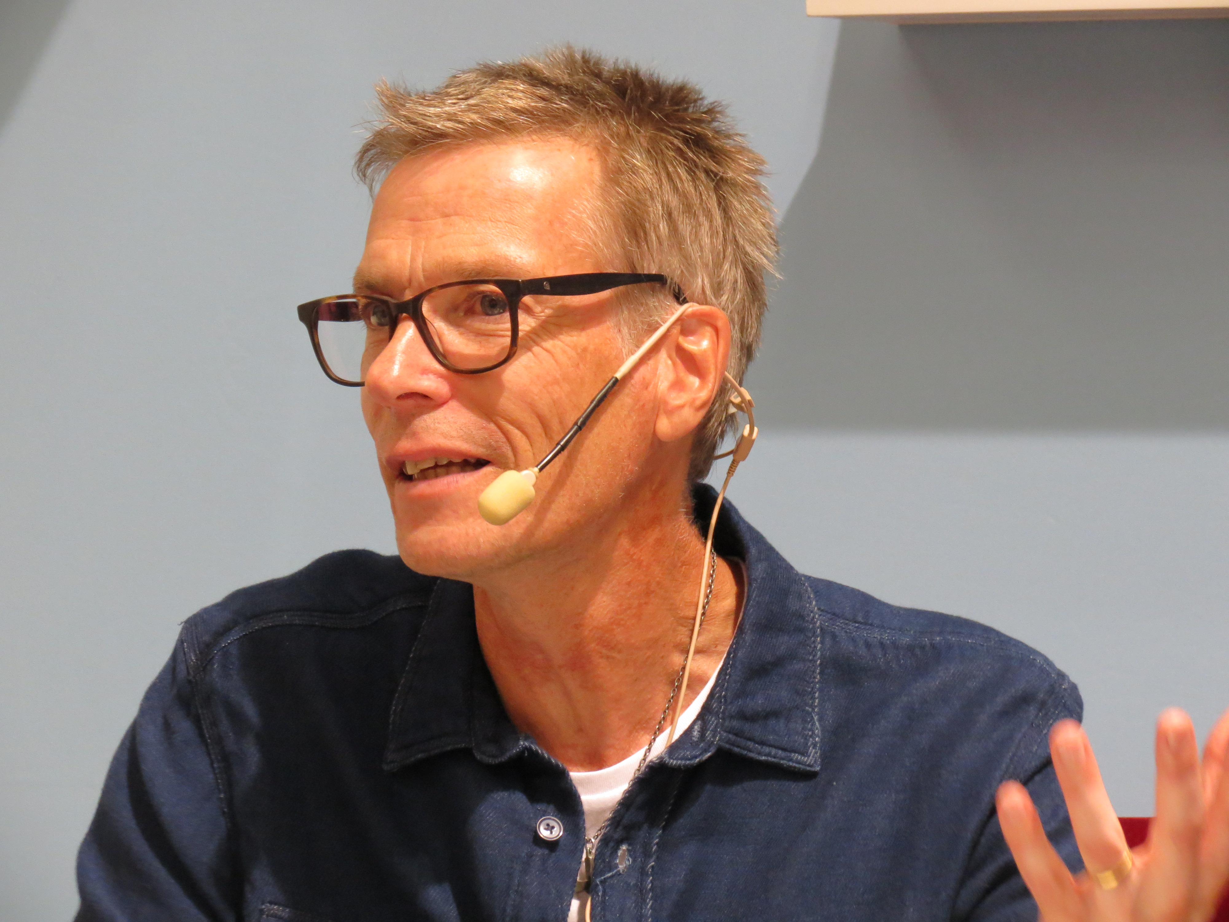 Johan Anderblad berättar om sina barnböcker om Bojan på Bokmässan i Göteborg.